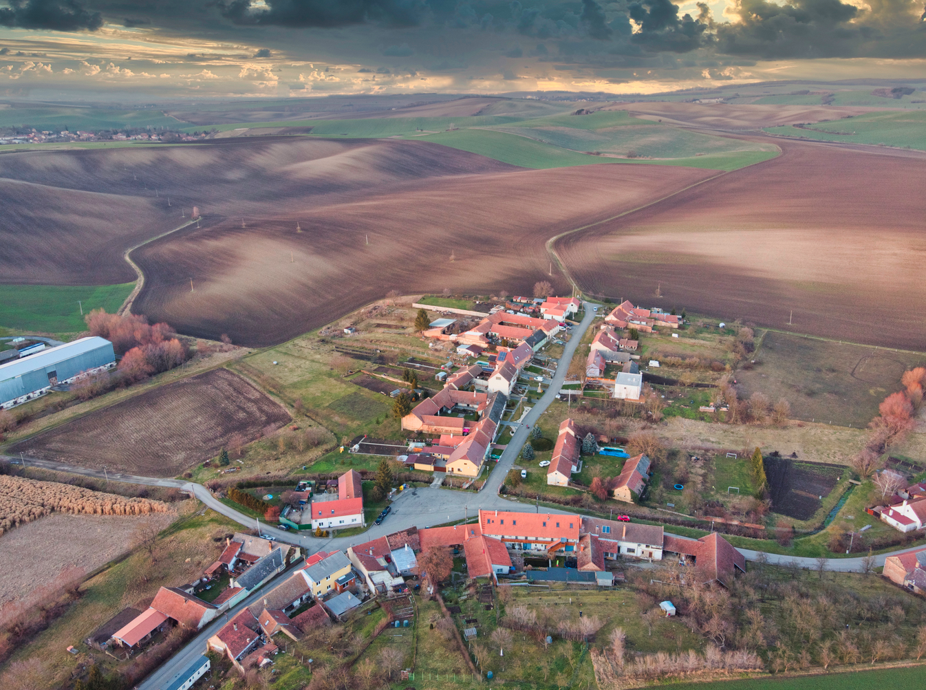 Původní samostatná obec Šardičky od roku 1942 spojená do s obcí Kojátky na bučovicku